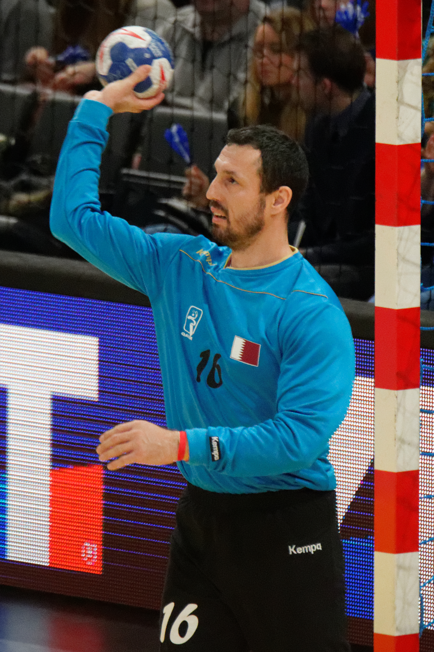 Goran Stojanović , le 10 janvier 2016 lors du match Norège / Qatar durant la Golden League à l'AccordHotel Arena (Paris).